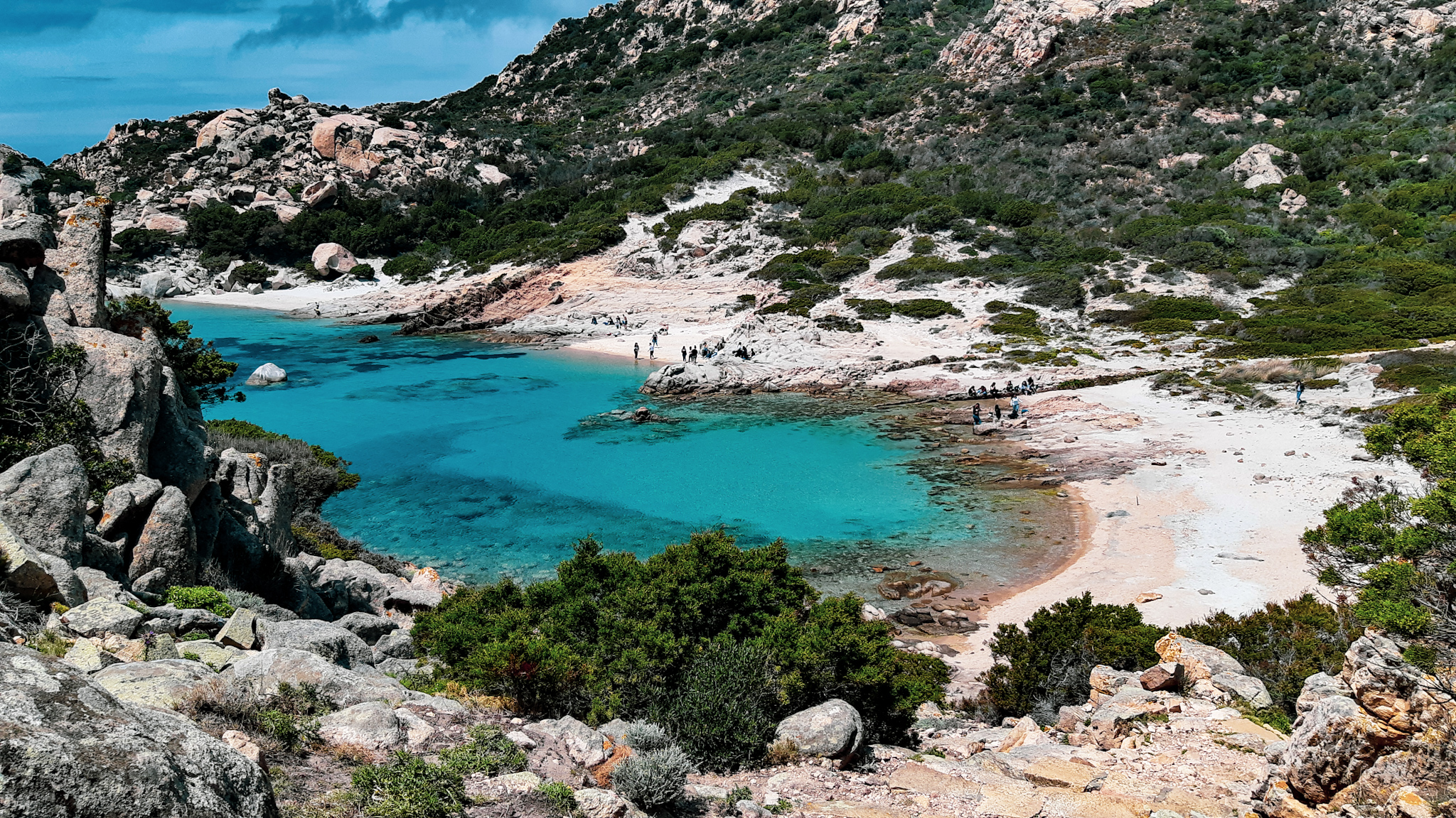 Parco nazionale dell'arcipelago di La Maddalena - Isola Spargi